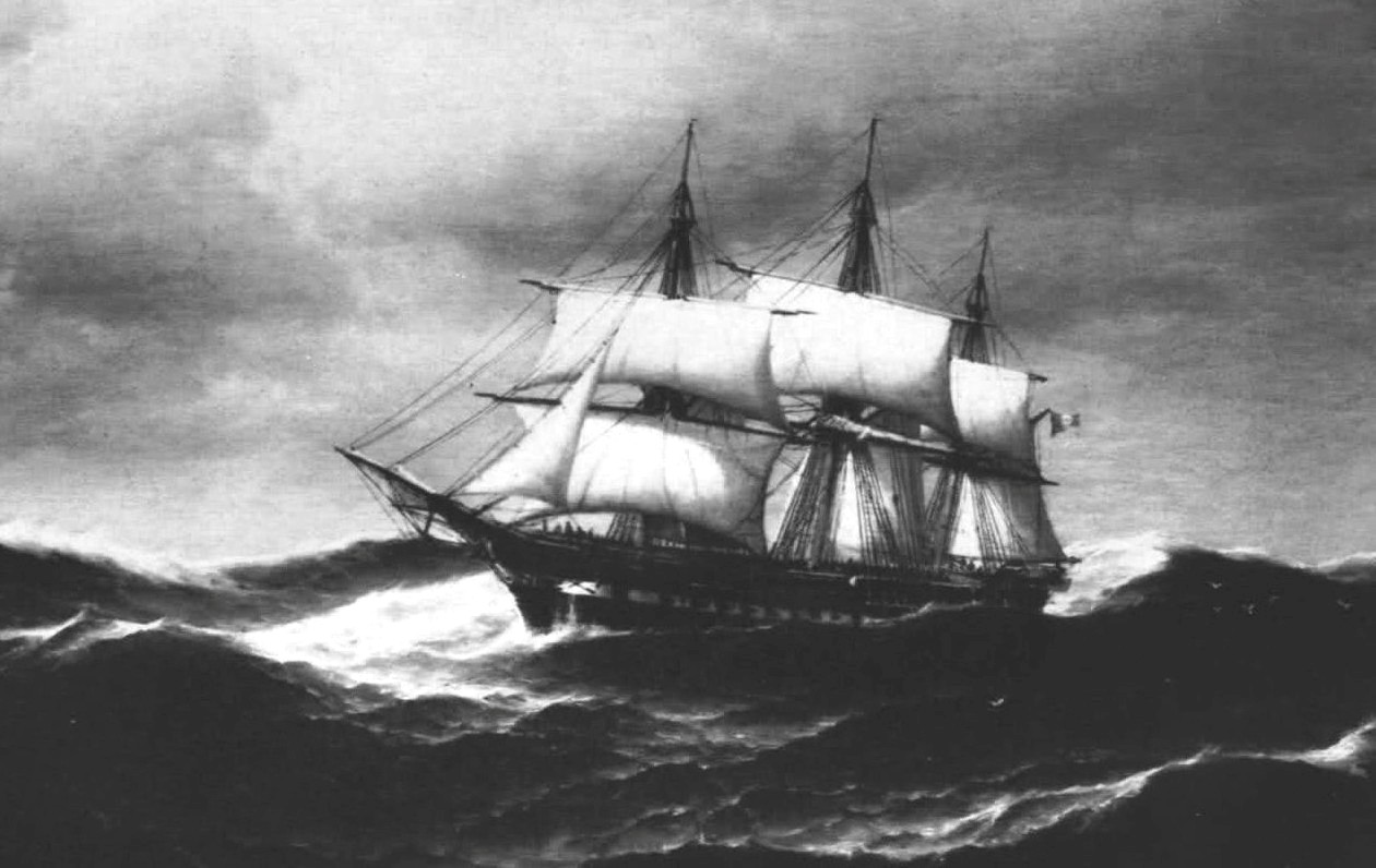 La fregata a vela Euridice affronta il mare in burrasca